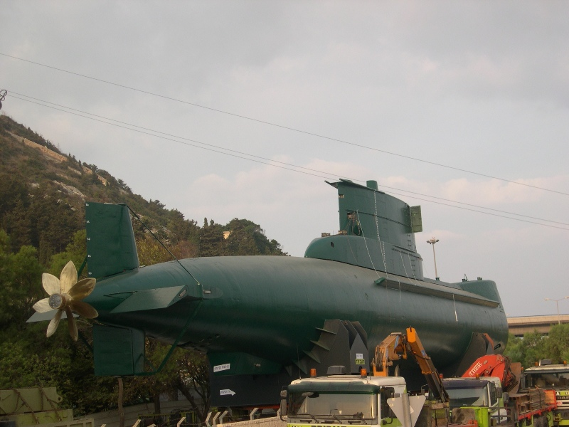 HN-INS Gal (wave), אח"י גל